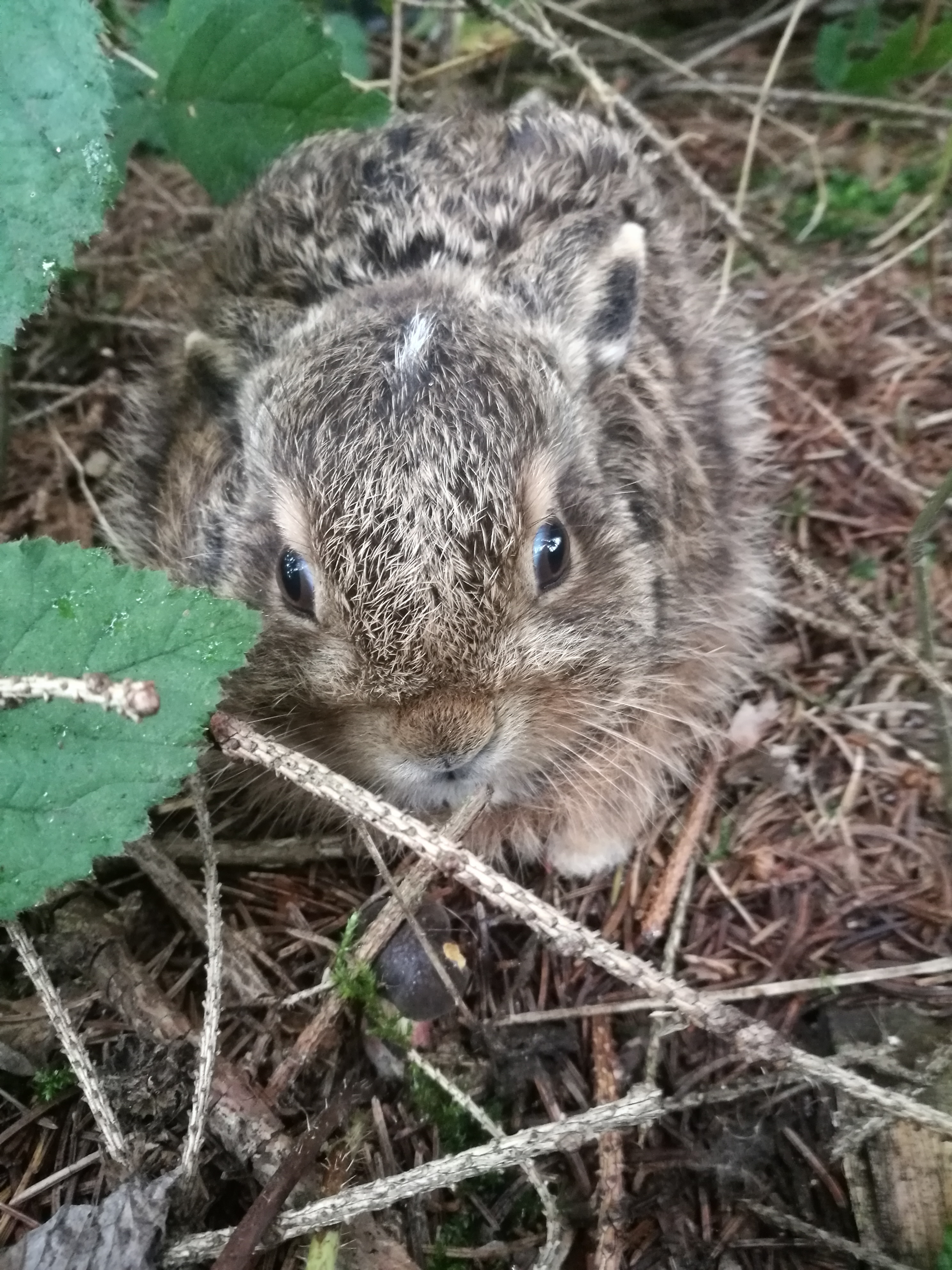 Feldhase_deutsch